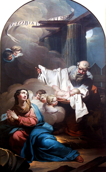 La Nativité